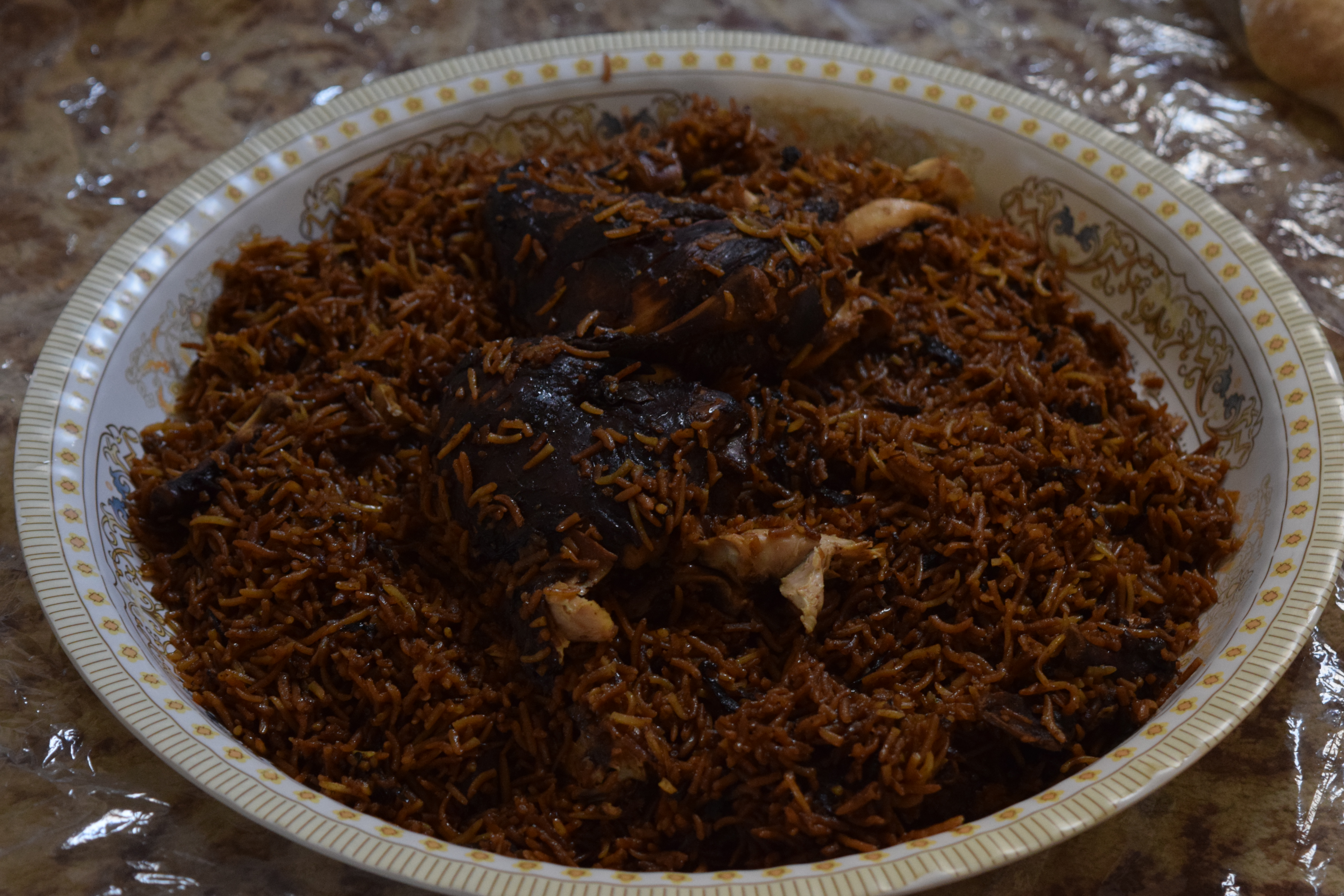 عيش المحموص بالدجاج